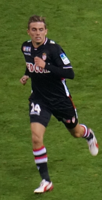 Joueur de foot en pleine action.